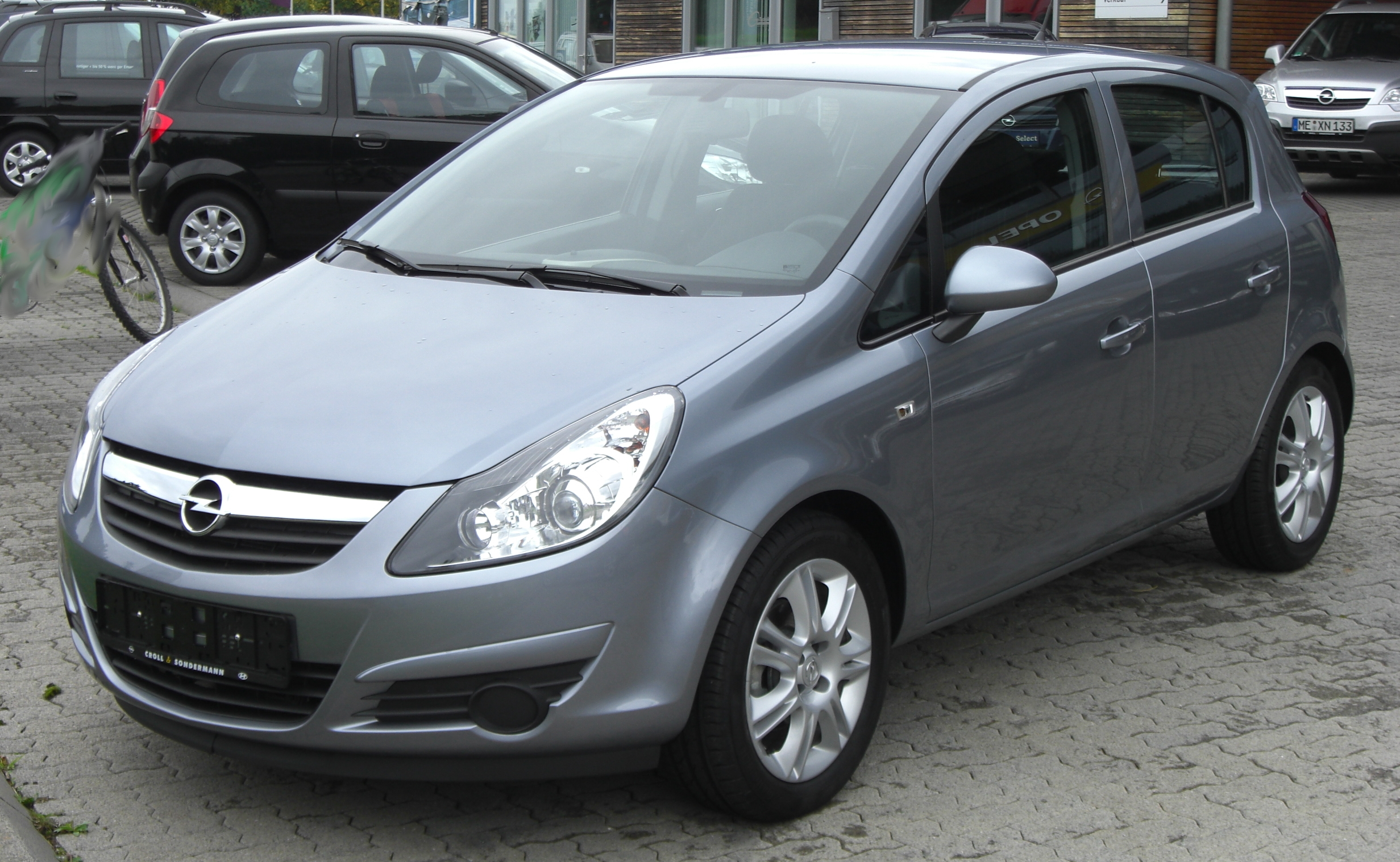 Opel Corsa D